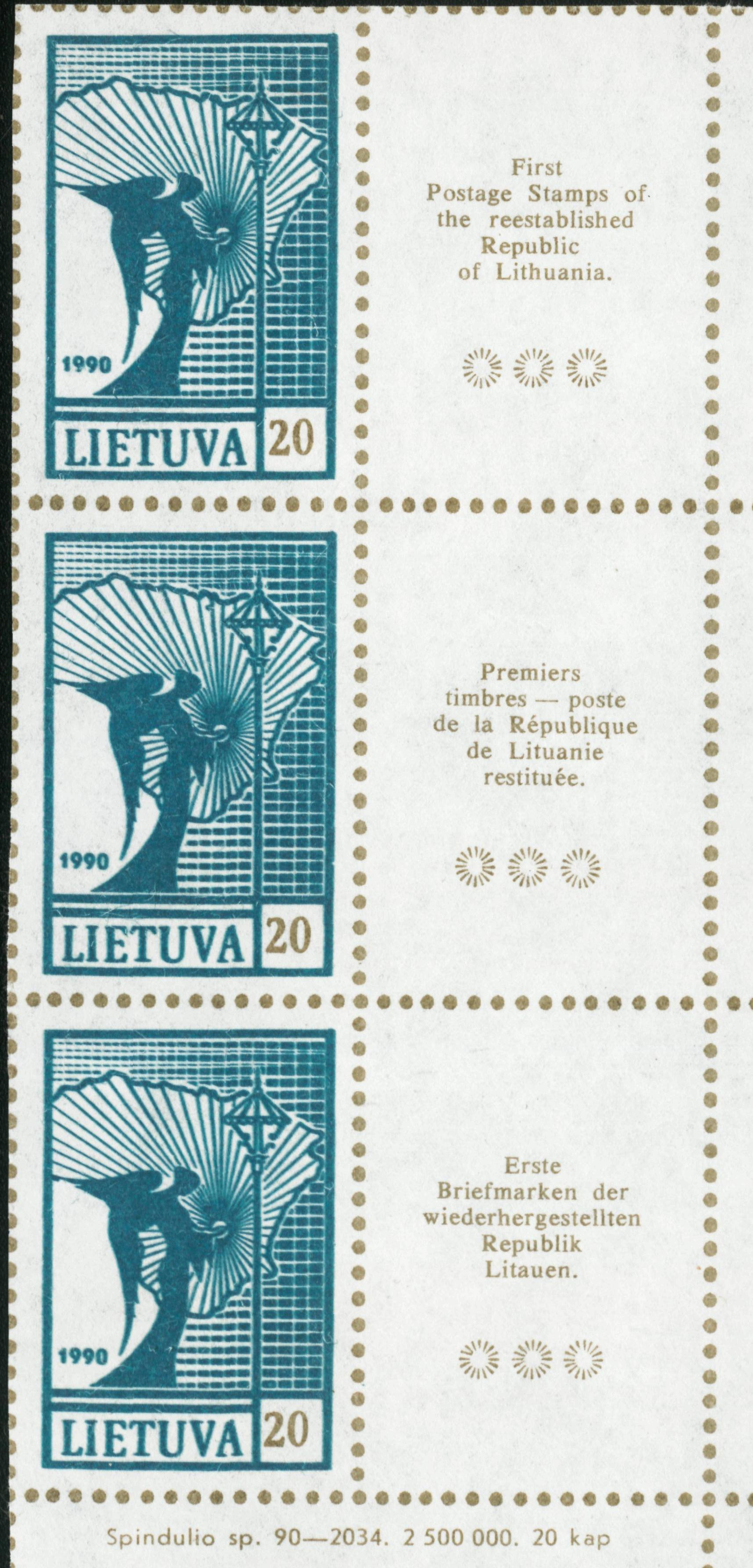 Первые почтовые марки восстановленной Литовской республики (самопровозглашение), 1990 год, огромный тираж 2 миллиона 500 тысяч экз. лист (30 миллионов экз. данная марка). Номинал 20 копеек. Правая часть марочного листа из 12 марок и 4 правых купонов на трёх языках (без русского). У данных марок нет перфорации, это плохого качества тонкий обычный лист бумаги. Марки при продаже на почте отрезались ножницами или отрывались по сгибу, как керенки.